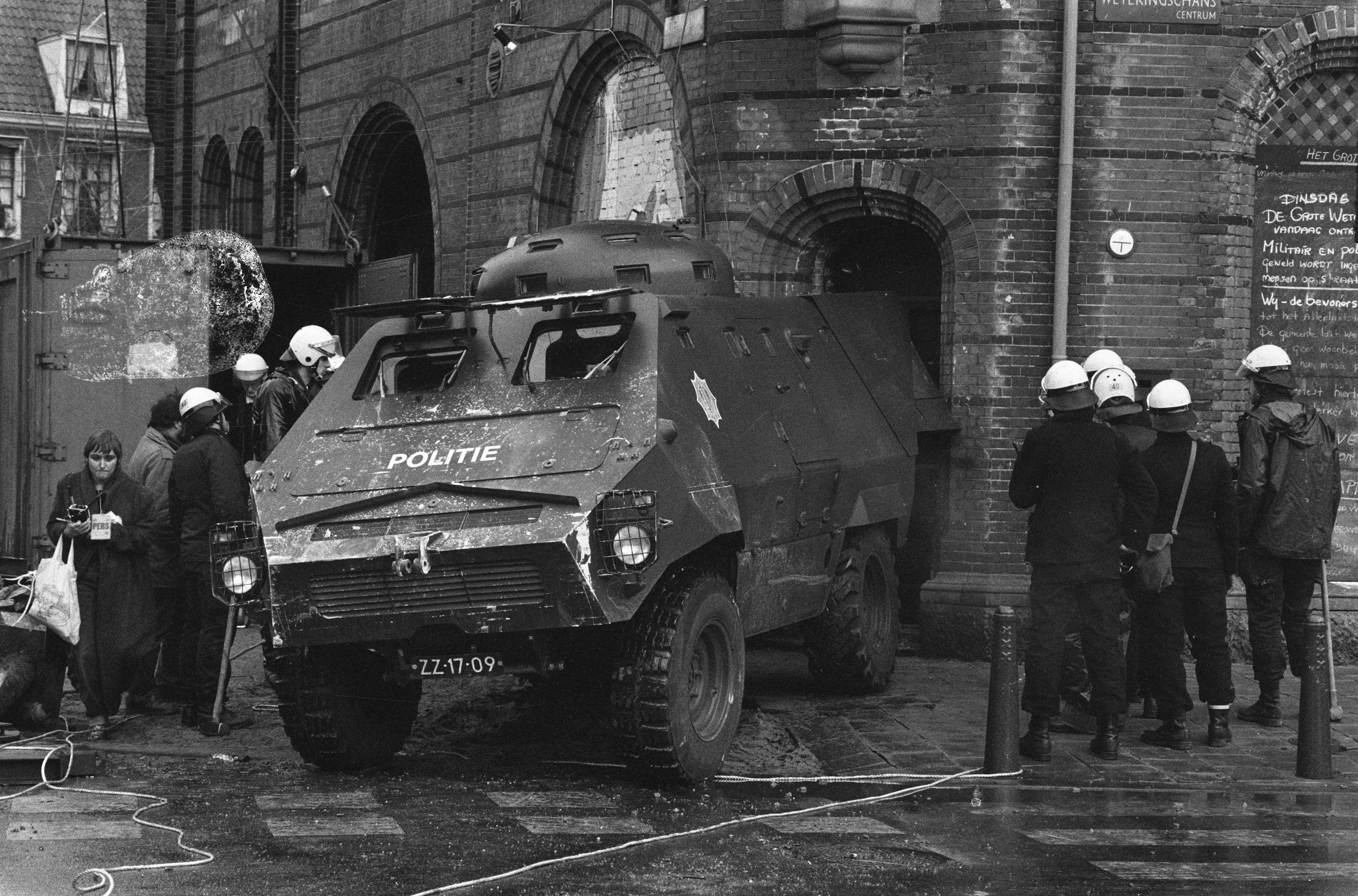 Collectie / Archief : Fotocollectie Anefo Reportage / Serie : [ onbekend ] Beschrijving : Ontruiming Grote Wetering, vandaag is een kraakpand in Amsterdam ontruimd door ME en marechaussee. Aan de achterzijde van de UR-416 pantserwielvoertuig is een afdak gemonteerd waaronder leden van de BRATRA veilig kunnen staan om de deur te openen zonder bekogeld te worden. Annotatie : Thyssen Henschel UR-416 Datum : 2 december 1980 Locatie : Amsterdam, Noord-Holland Trefwoorden : krakers, mobiele eenheid, ontruimingen, pantservoertuigen, rellen Persoonsnaam : Grote Wetering, Ur416 Instellingsnaam : Koninklijke Marechaussee Fotograaf : Bogaerts, Rob / Anefo Auteursrechthebbende : Nationaal Archief Materiaalsoort : Negatief (zwart/wit) Nummer archiefinventaris : bekijk toegang 2.24.01.05 Bestanddeelnummer : 931-1856